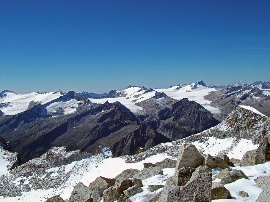 Masiv Adamello z Presanelly